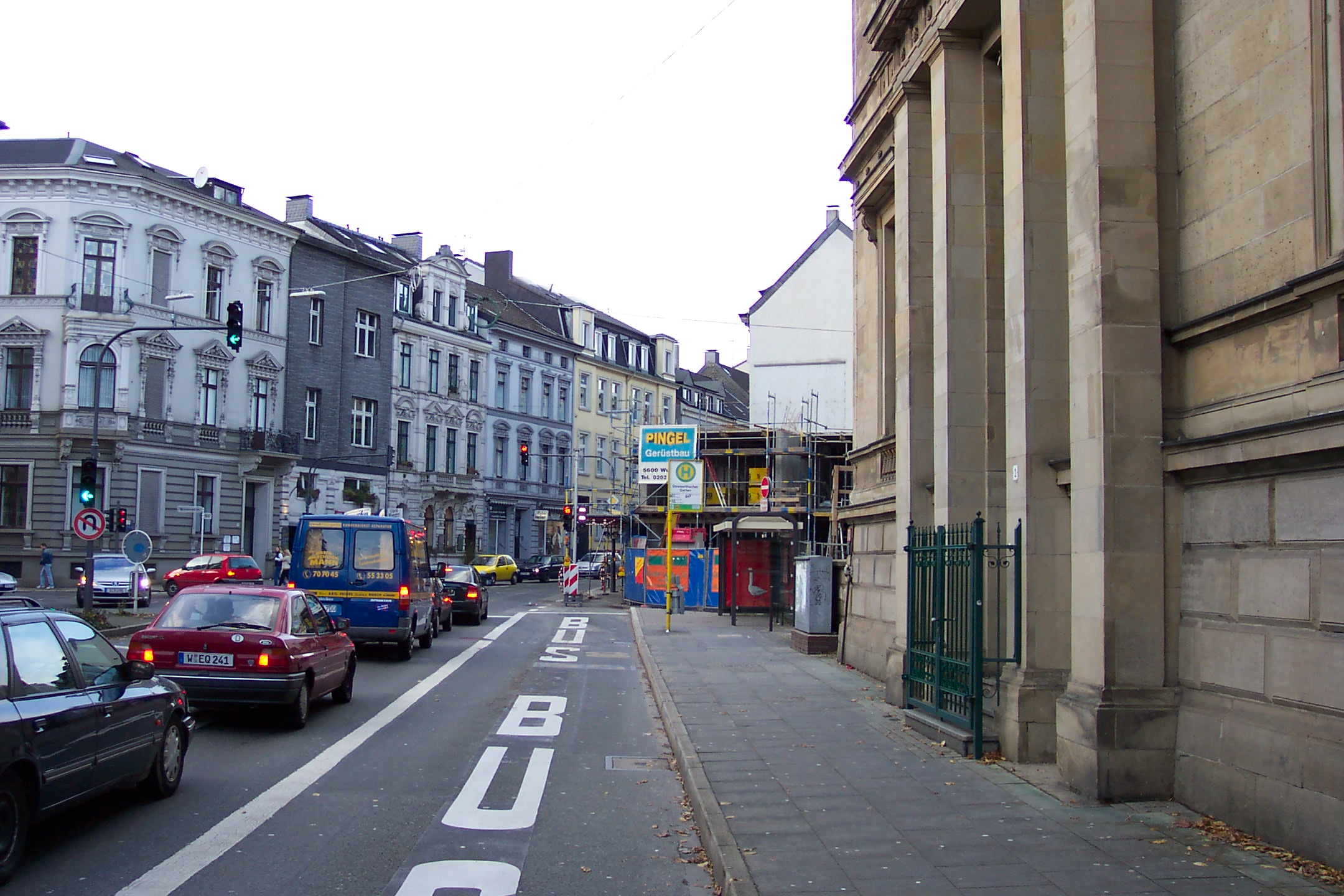 Briller Straße, Wuppertal